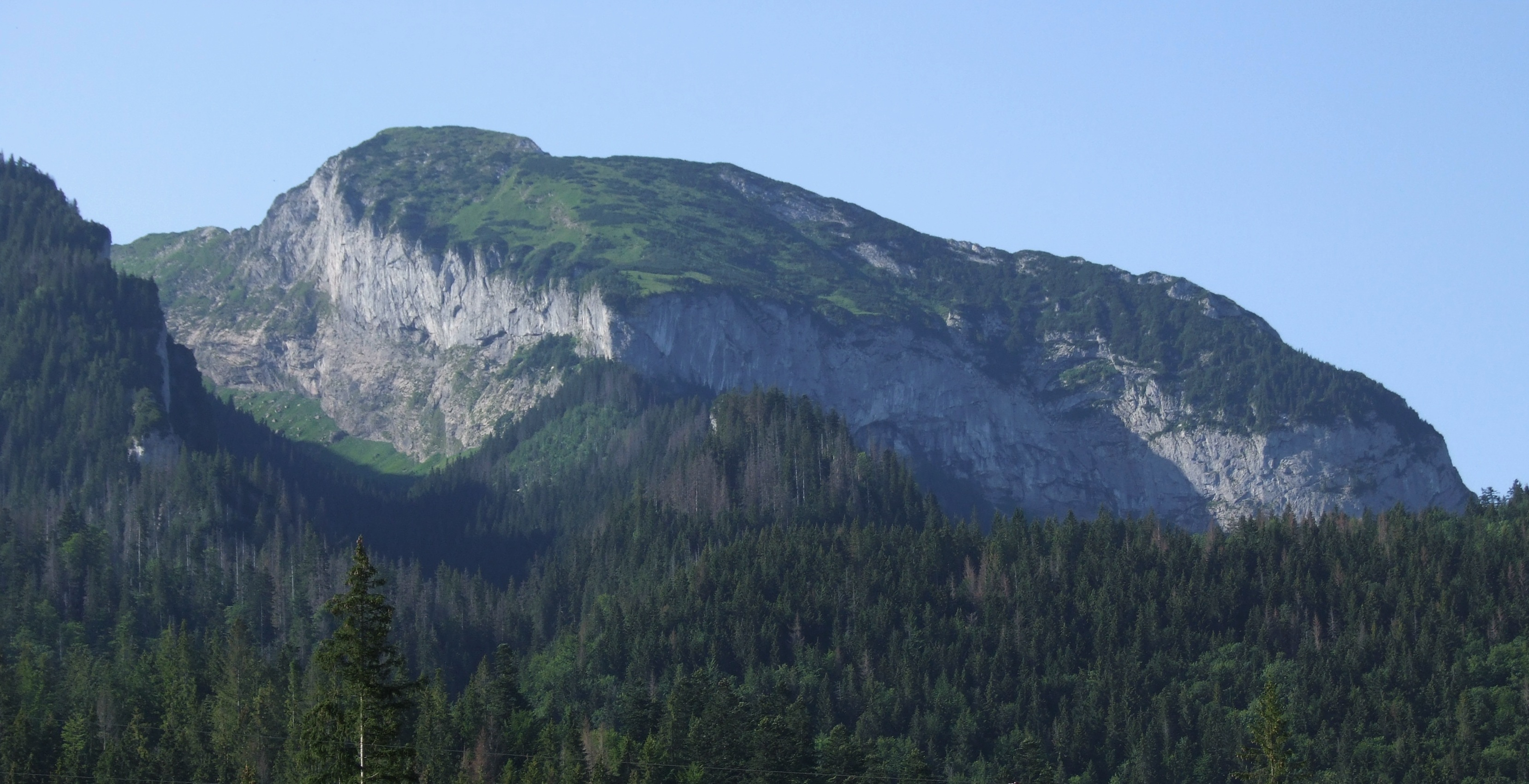 Murań od północnej strony, widoczna Jagnięca Zagroda. Po lewej stronie Murania Nowa Dolina.